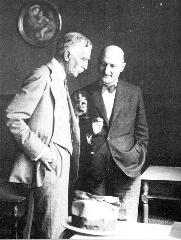 Manuel Ainaud Sanchez - amb Francesc Macia 1932